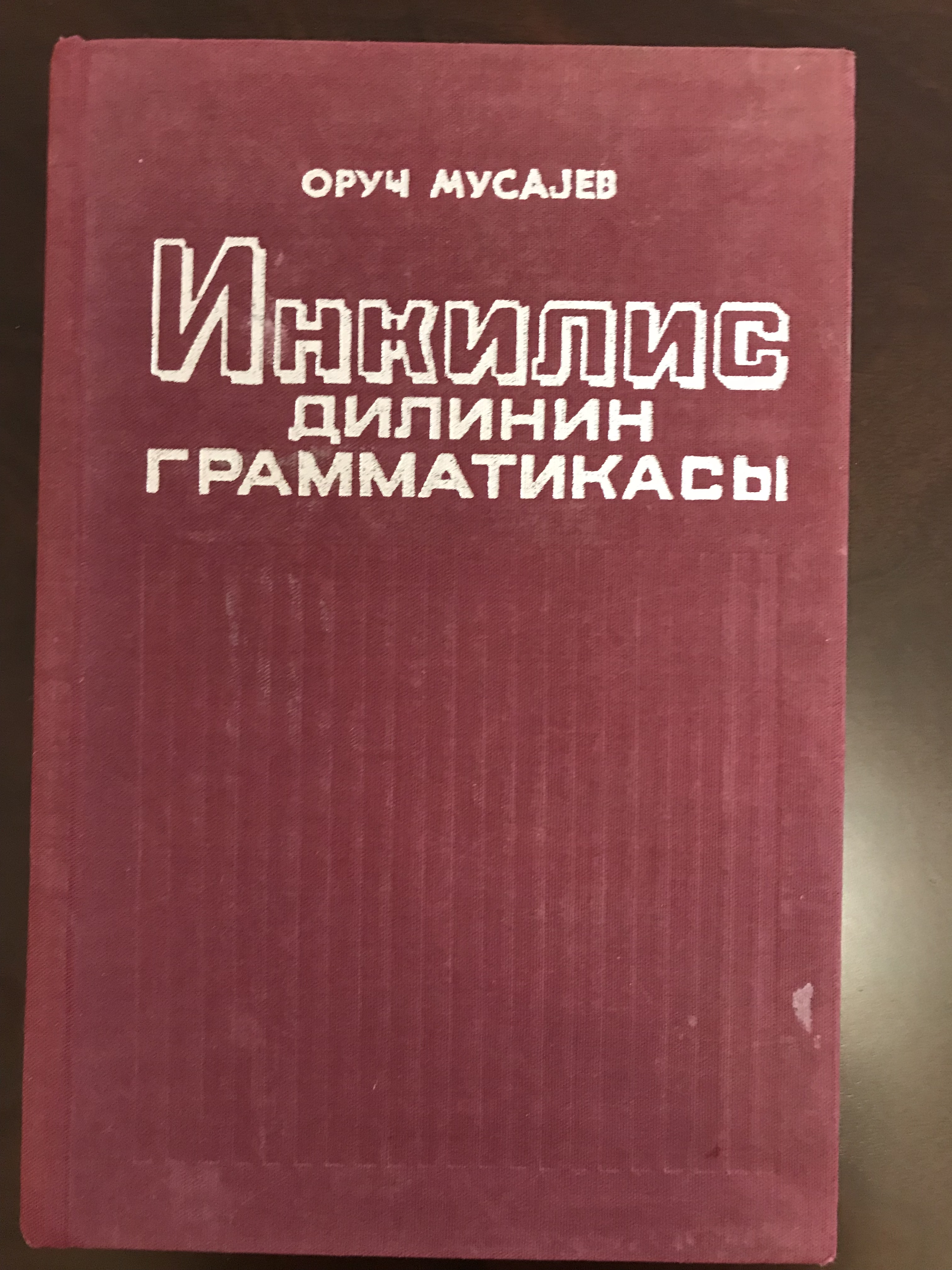 İngilis Dilinin Qrammatikası. Bakı - 1979